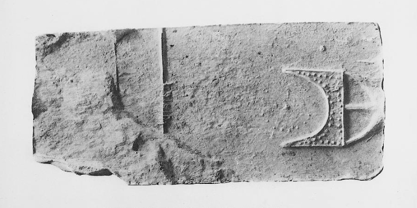 Fotografie des Abdruckes einer Gussform aus Schiefer. Gefunden im Oktober 1899 nordwestlich des Ortes Palekastro.